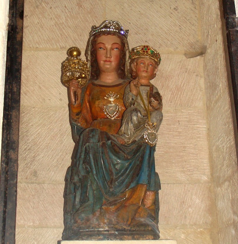 Vierge à l'enfant, statuette ancienne en bois peint, intérieur de la chapelle N.D. de la Galline, à la Nerthe (Marseille, 16e arr.). L'enfant Jésus porte sur son bras gauche une poule ("galino" en provençal), d'où le nom de la chapelle.